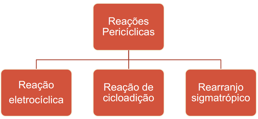 Esquema inicial